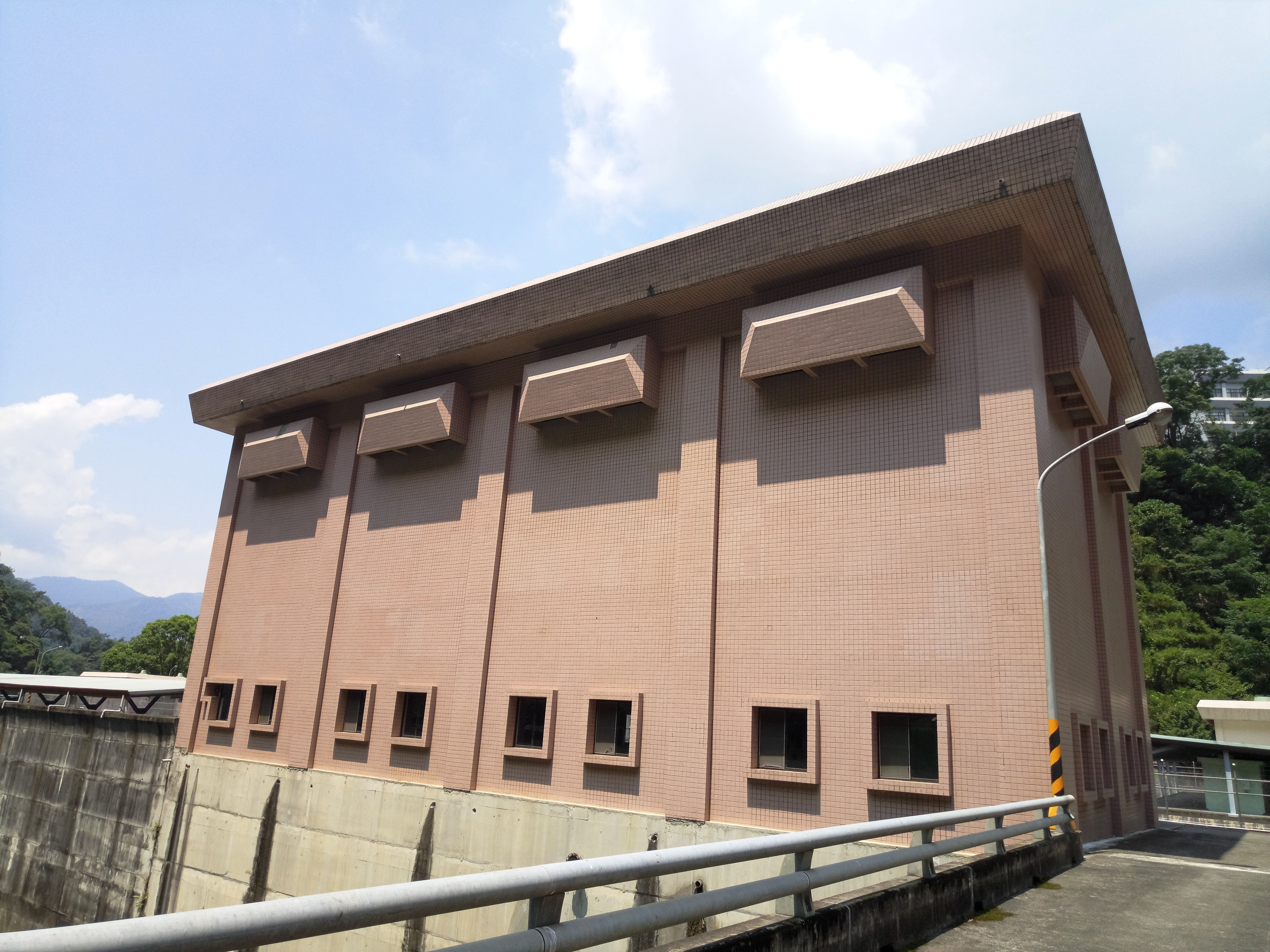 明潭發電廠水里機組發電廠房外觀